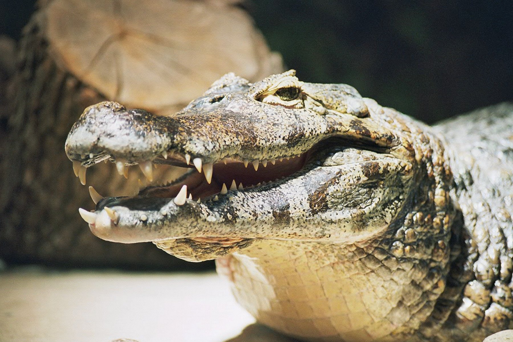 Zoo Rostock: Brillenkaiman (Caiman yacare, früher Caiman crocodilus yacara)